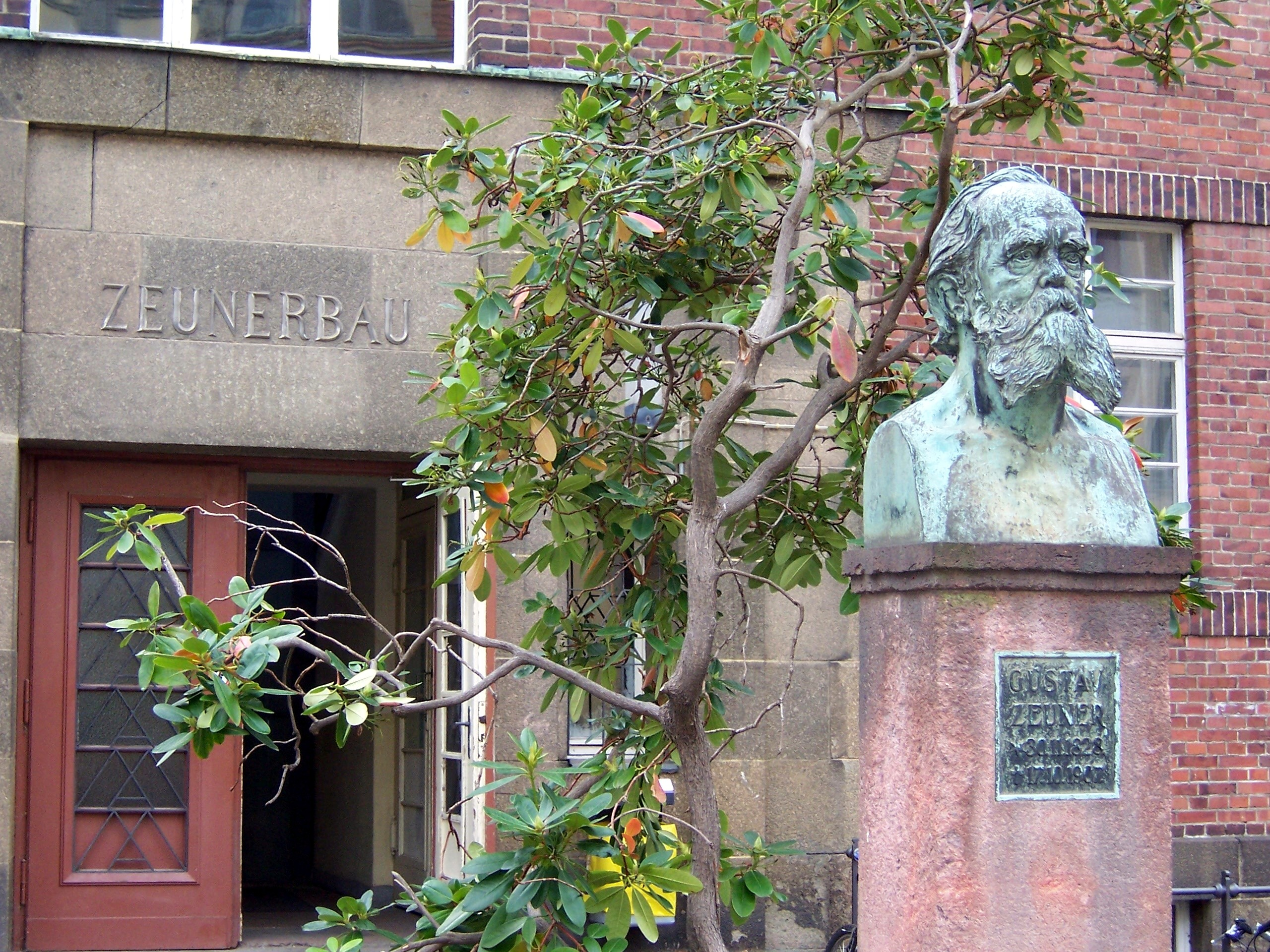 Stele Gustav Zeuners vor dem nach ihm benannten Zeunerbau der TU Dresden.